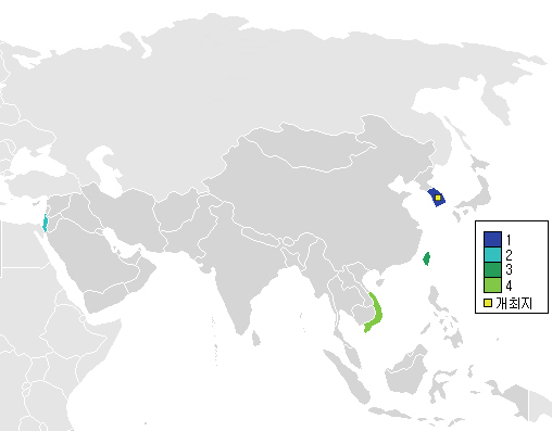 1960년 AFC 아시안컵 정보